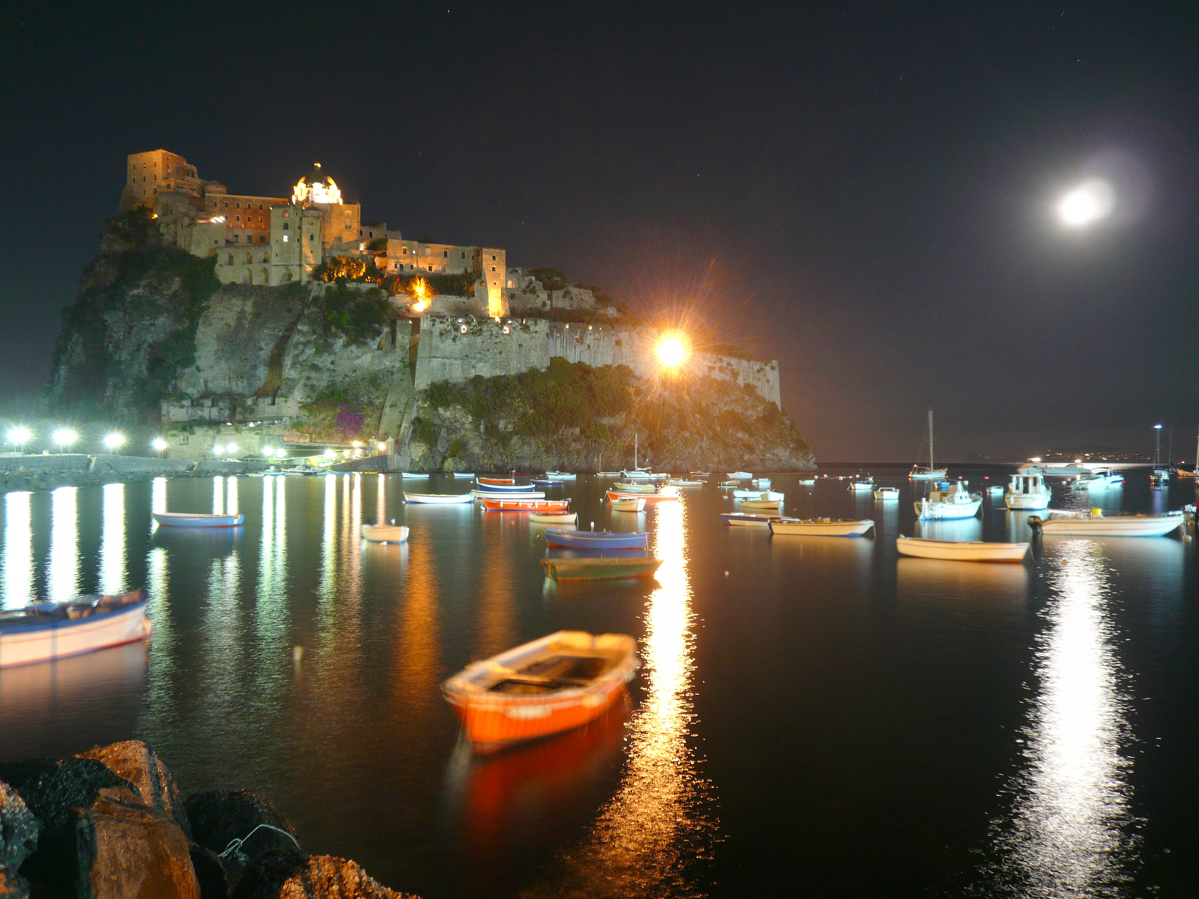 veduta notturna del Castello Aragonese di Ischia. Autore foto: Roberto De Martino